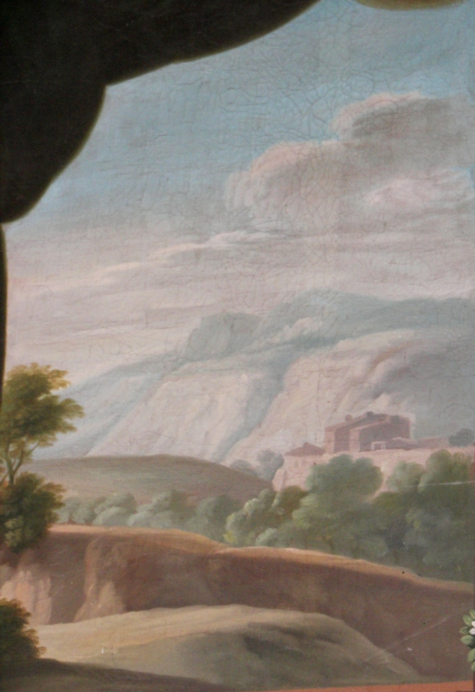 Sacra Famiglia, Olio su tela del 1841, Giuseppe Rapisardi. Chiesa Madre di Santa Maria di Licodia